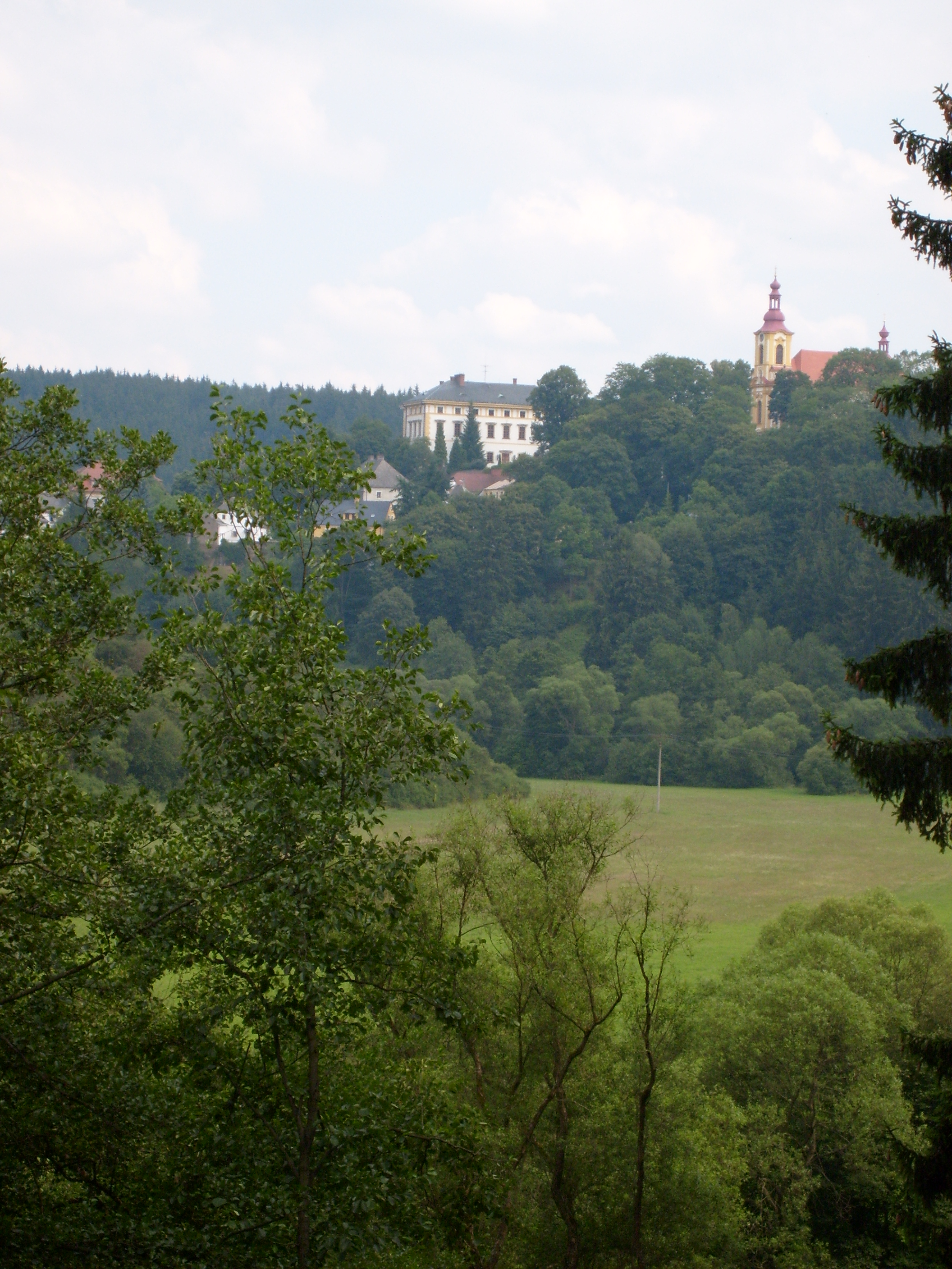 Rabštejn nad Střelou, Plzeň region, Czech Republic